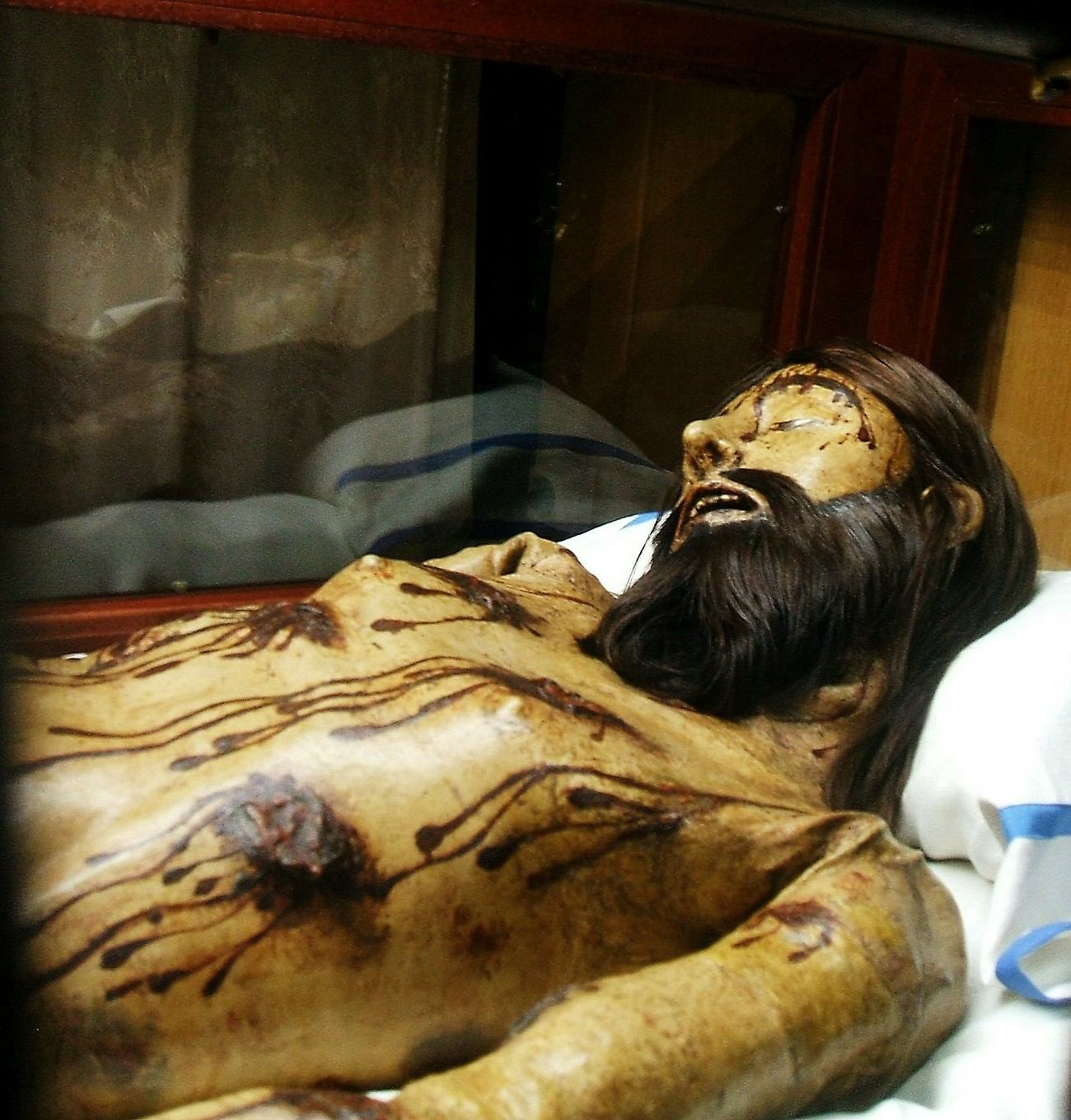 El Cristo del Monasterio de Santa Clara (s-XV), en la ciudad de Palencia, Castilla y León, España/Spain